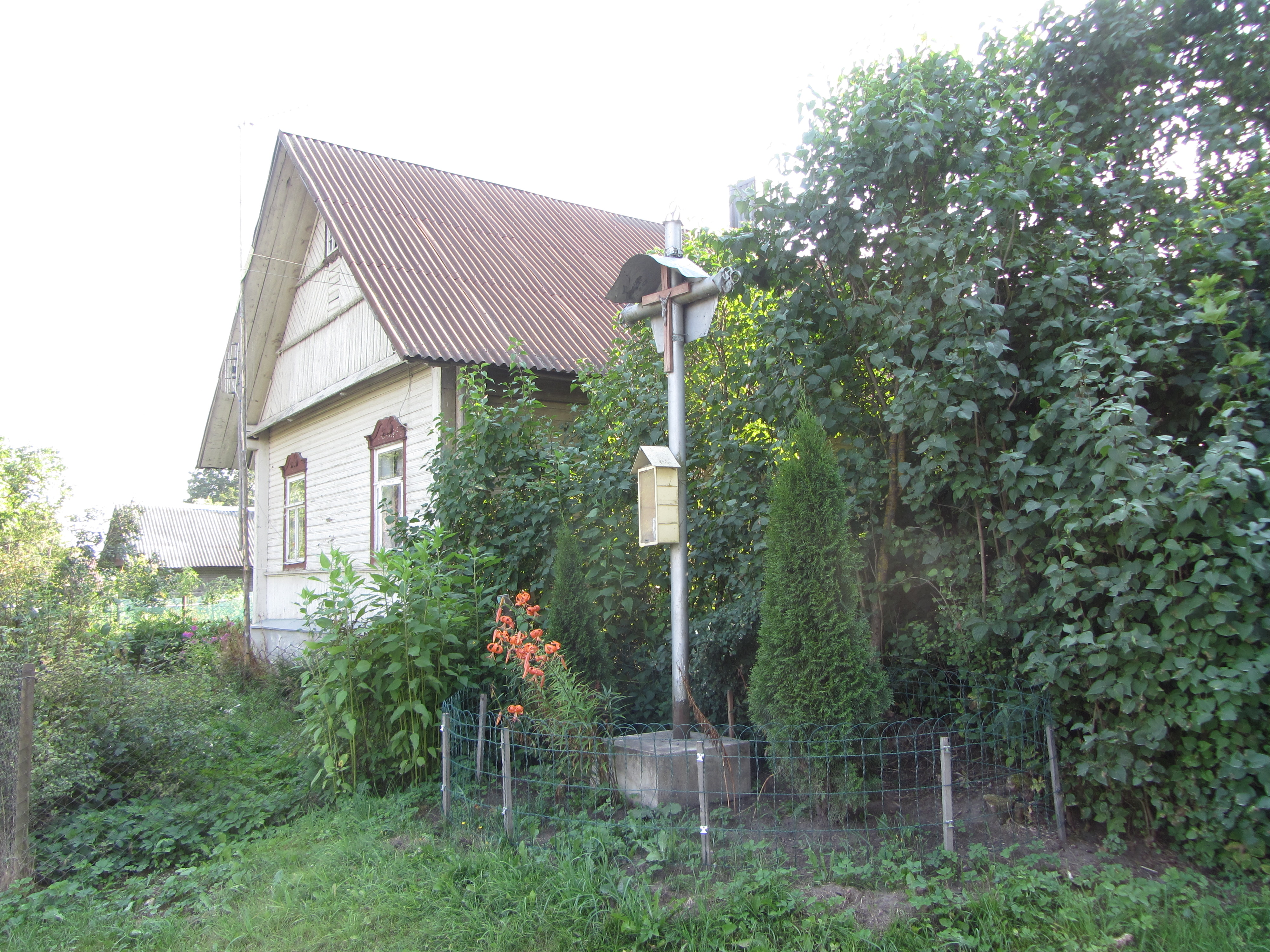 Senasalis 13200, Lithuania